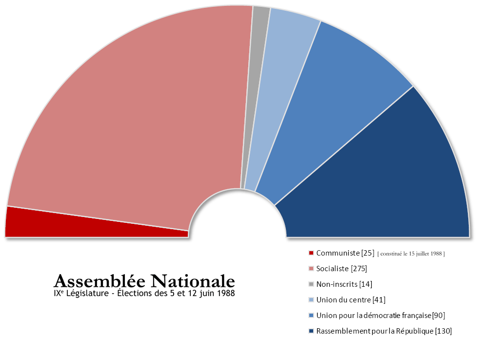 Assemblée Nationale française issue des élections de juin 1988